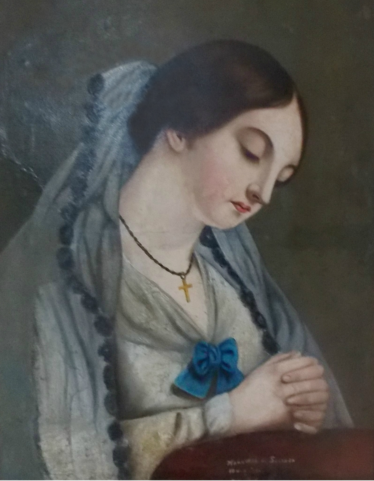 Retrato que lleva por nombre "Mariana de Solanda", en el que aparece Mariana Carcelén de Guevara y Larrea, VII marquesa de Solanda y VI de Villarocha. Esposa de Antonio José de Sucre, Gran Mariscal de Ayacucho y héroe de la Independencia latinoamericana. Después del asesinato de su primer marido contrajo segunda nupcias con el general Isidoro Barriga, quien al igual que su primer esposo también había formado parte de los ejércitos bolivarianos.